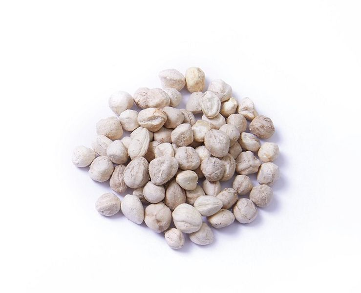 모링가